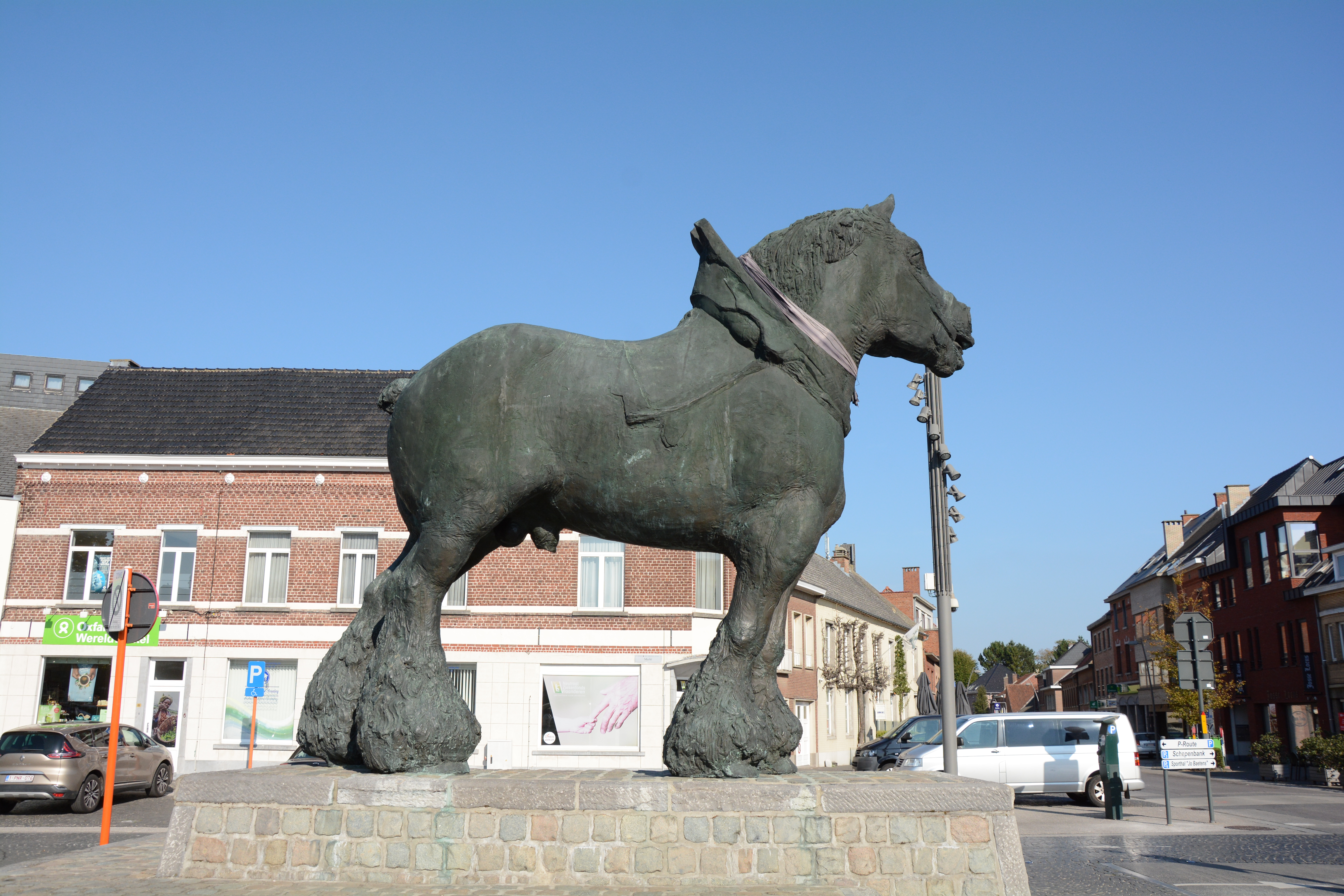 Prins, de Trots van Brabant door Koenraad Tinel, Lennik (België)